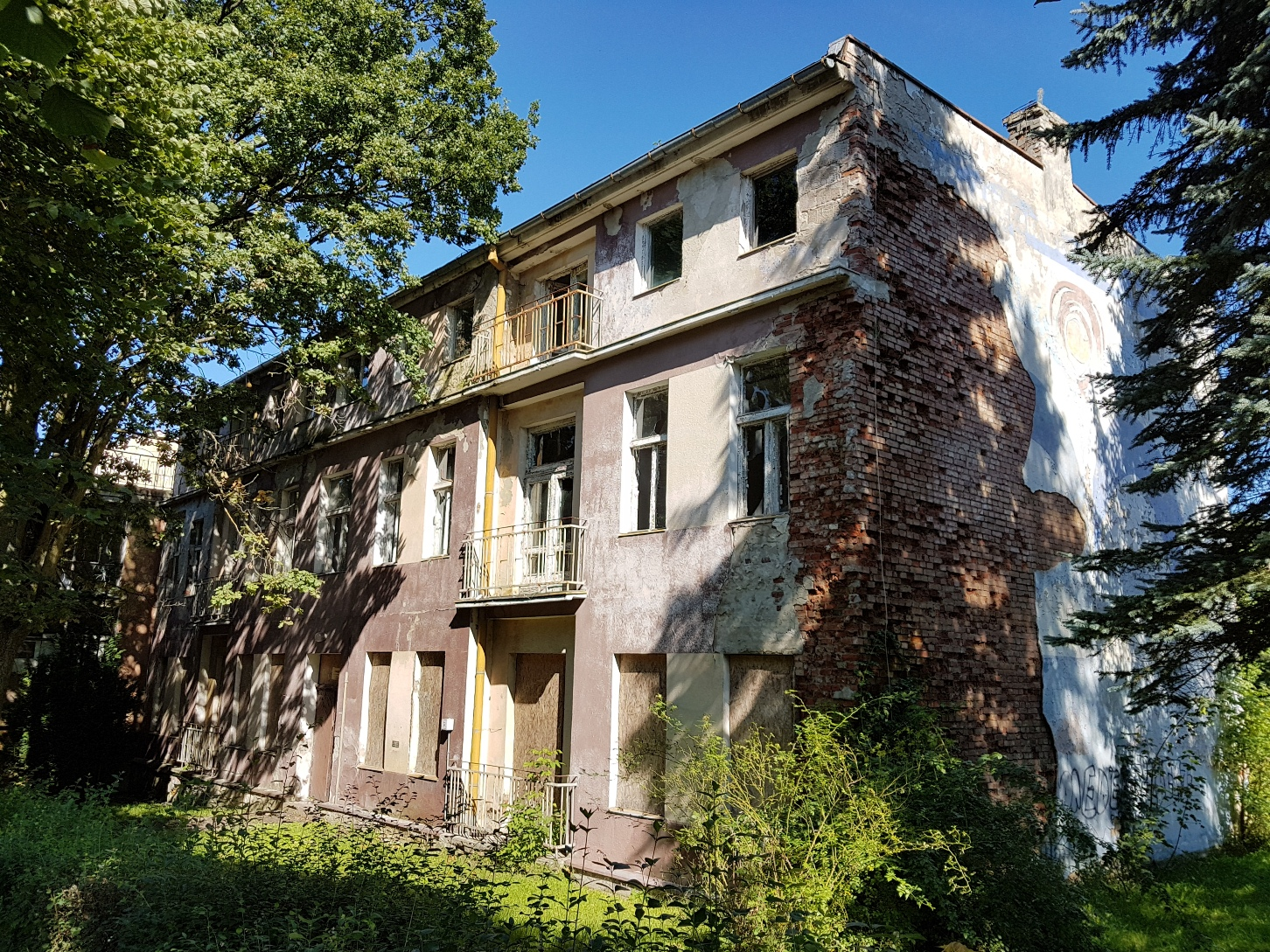 Połczyn Zdrój, 2017. Budynek przy Zdrojowej 2, dawny budynek rodu Levy'ch